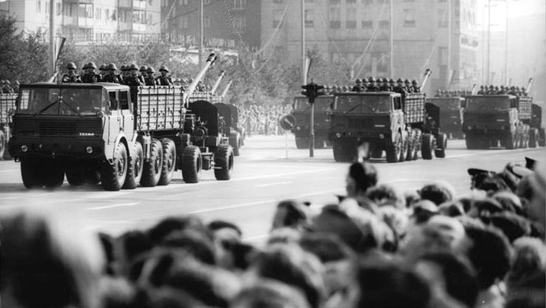 Berlin, 25. Jahrestag DDR-Gründung, Parade ADN-ZB Koard 7.10.74 Berlin: 25. Jahrestag -Ehrenparade der Nationalen Volksarmee auf der Karl-Marx-Allee. Vorbeizug von 100-mm-Flaks mit Zugmaschinen vom Typ Tatra 813.